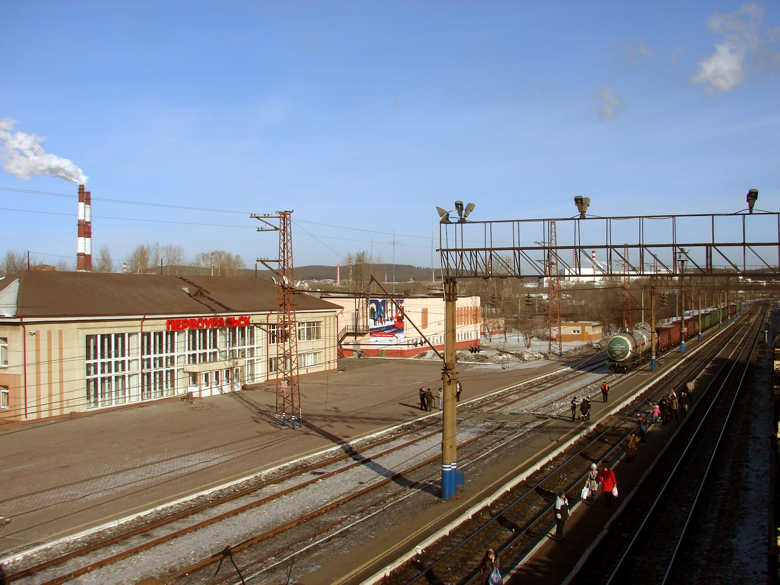 Железнодорожная станция Первоуральск, Свердловская железная дорога